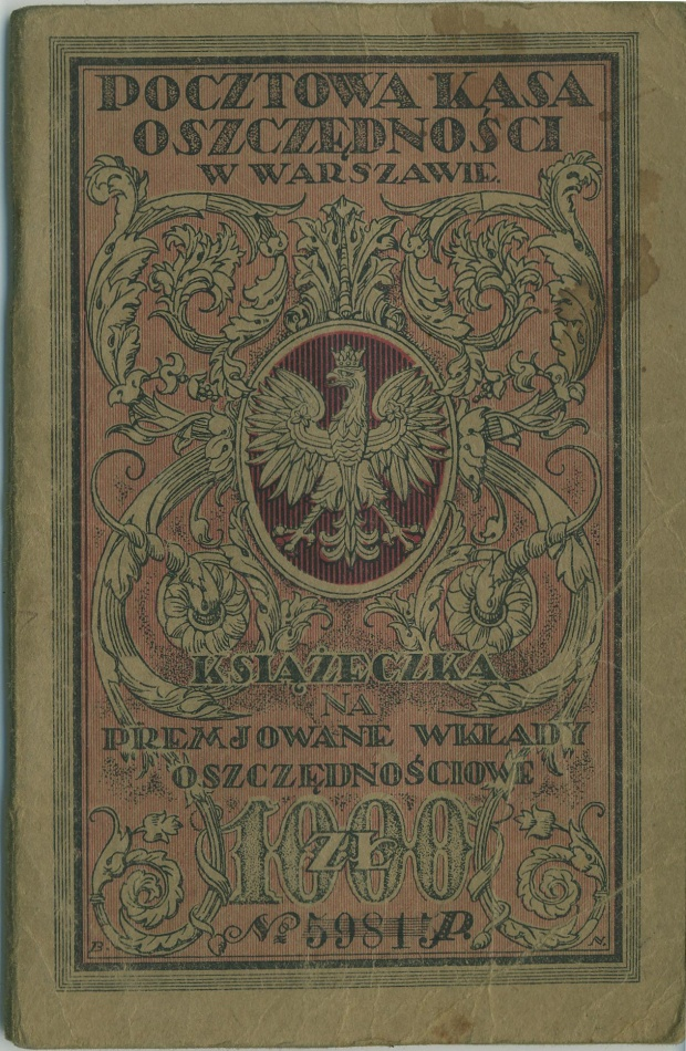 Cover of savings booklet of Pocztowa Kasa Oszczędności (PKO) - Post Savings Bank in Poland, 1924